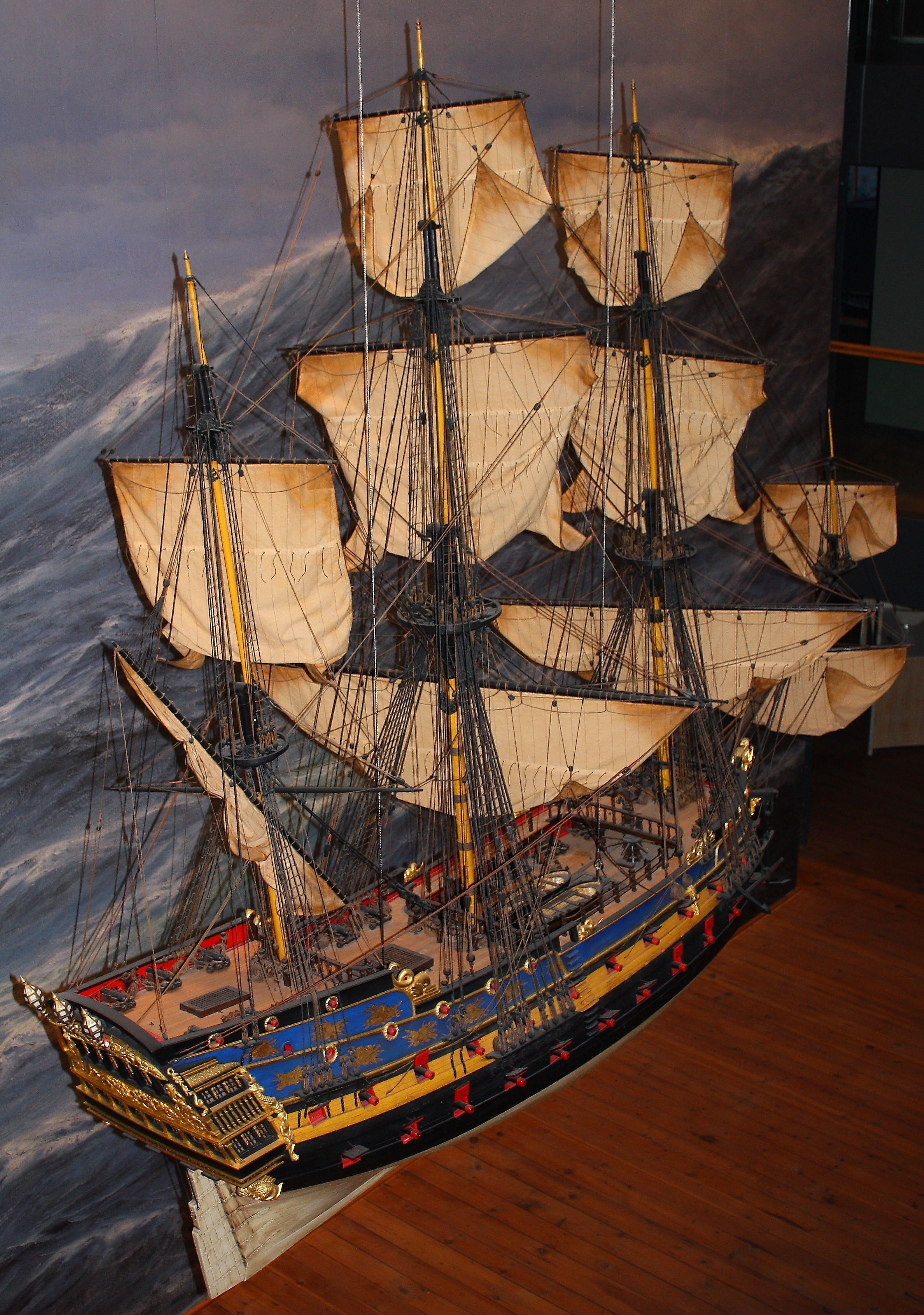 Totale der Backbordansicht des Konvoischiffes Wapen von Hamburg (III)